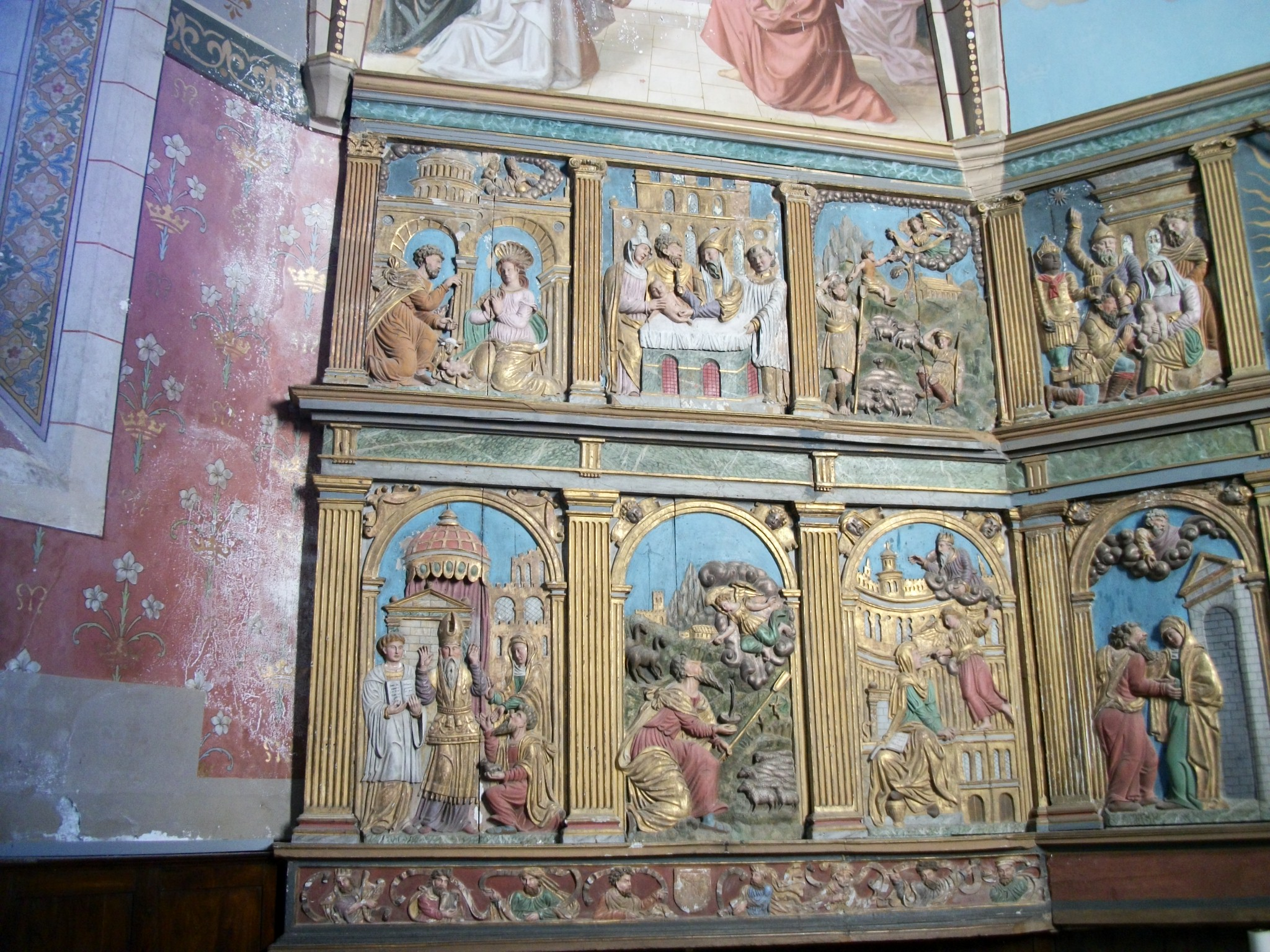 Le panneau gauche du retable